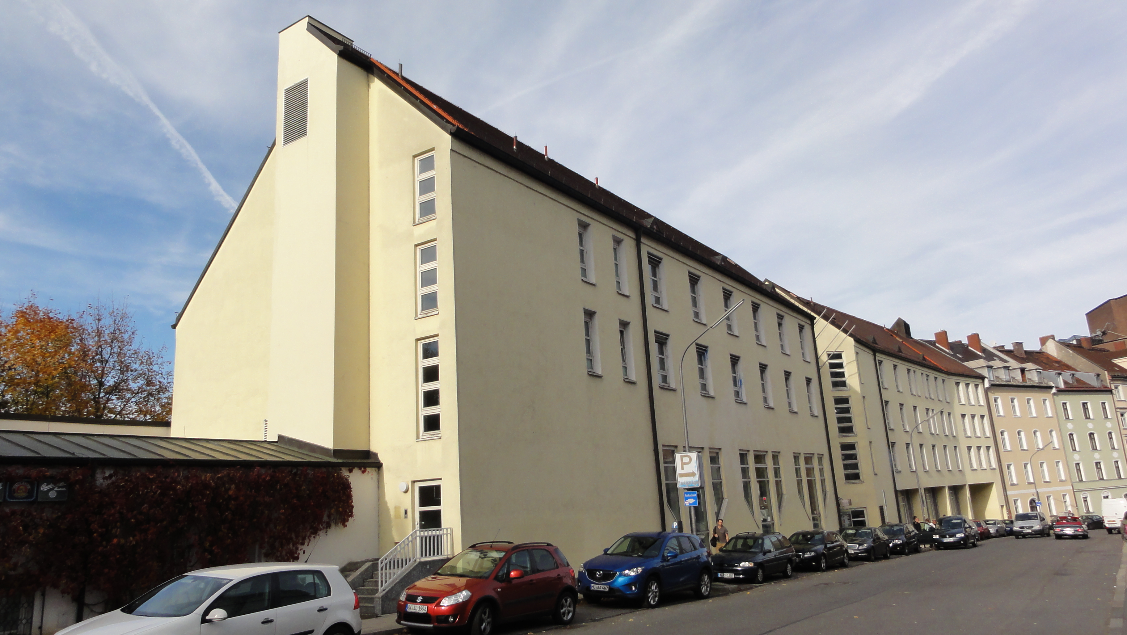 Munich-Au, Hochstraße 8 - Sudetendeutsches Haus, Gesamtansicht